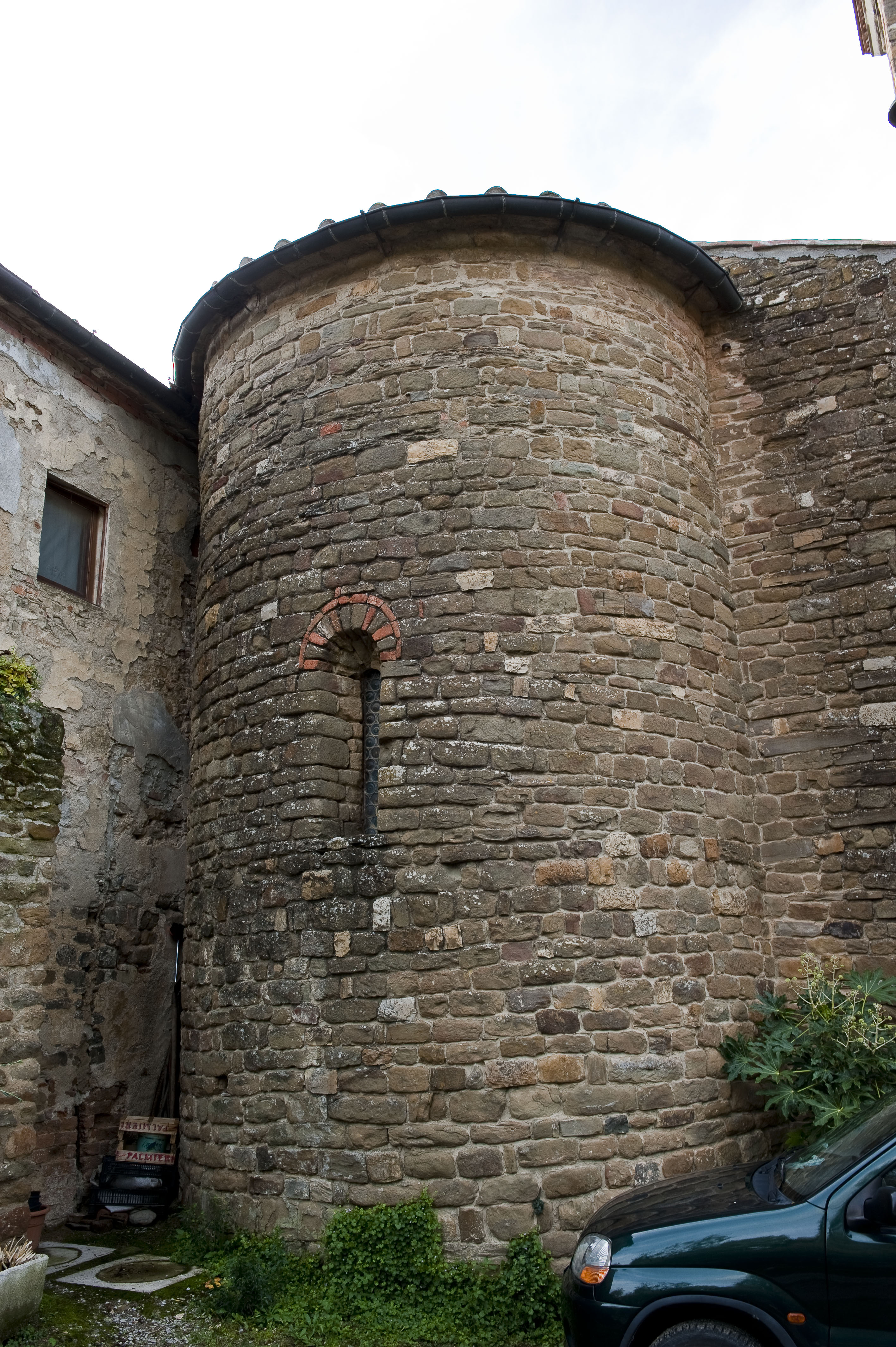 Abside della pieve di San Miniato di Rubbiana, San Polo in Chianti, Greve in Chianti (Firenze)